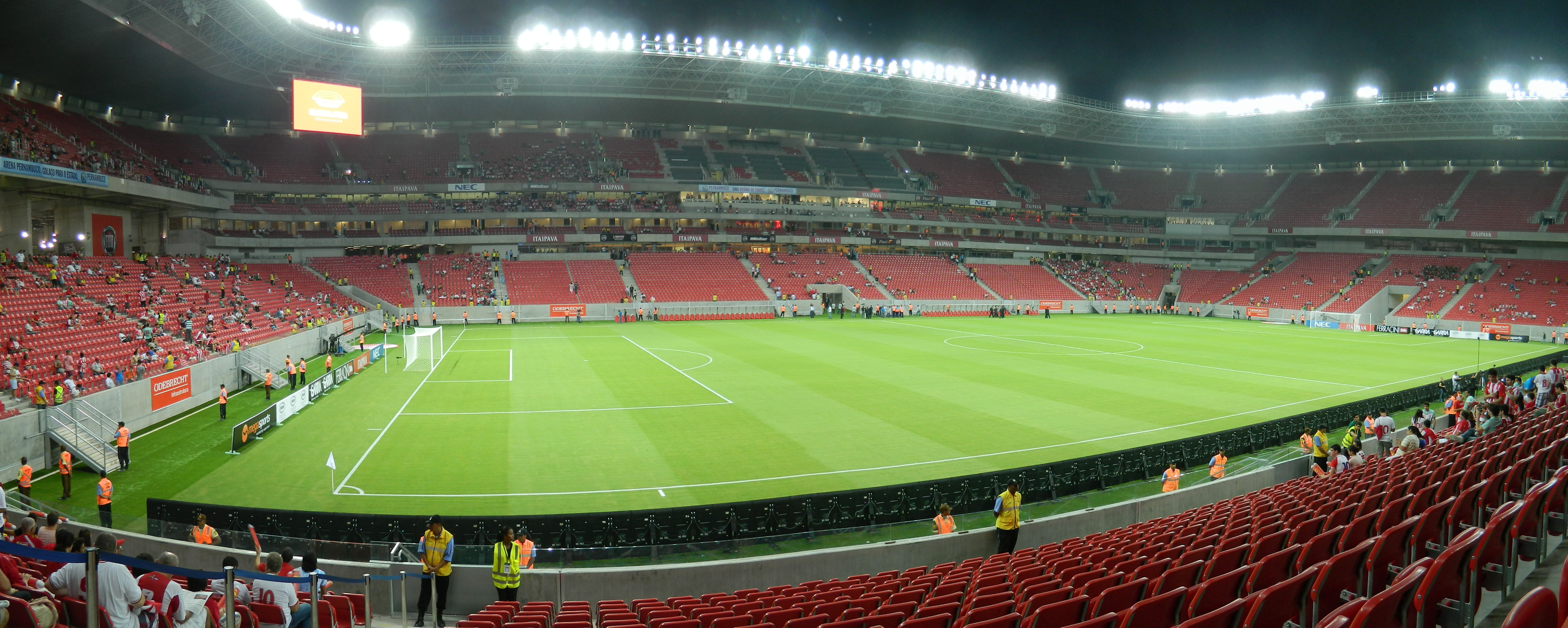 Panorâmica da Arena Pernambuco em 22.05.2013, dia do jogo oficial inaugural entre Náutico e Sporting Lisboa. Placar 1 x 1.